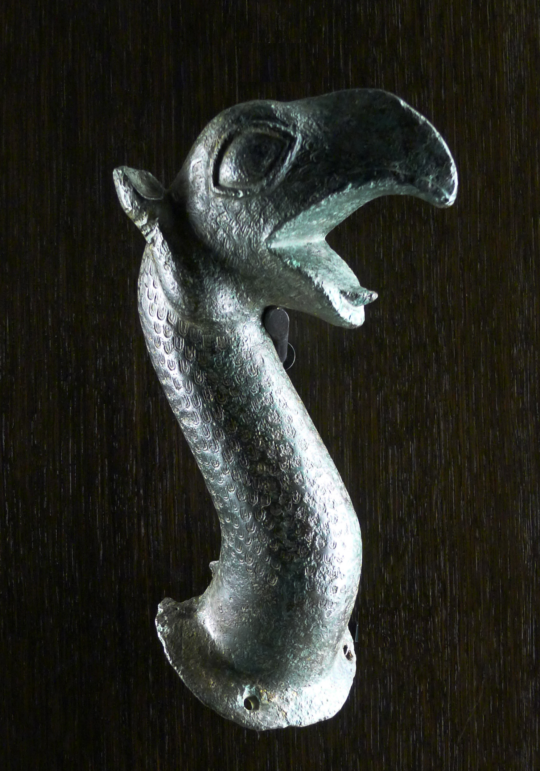 Protomé de griffon (il s'agit d'une anse d'un grand chaudron transporté sur la Loire) Bronze Pièce en provenance de Grèce ou d'Etrurie, vers 600 av. J.-C. ; trouvée à Port-Thibault dans la commune de Sainte-Gemmes-sur-Loire au 19e siècle. n° inventaire : MA5R444